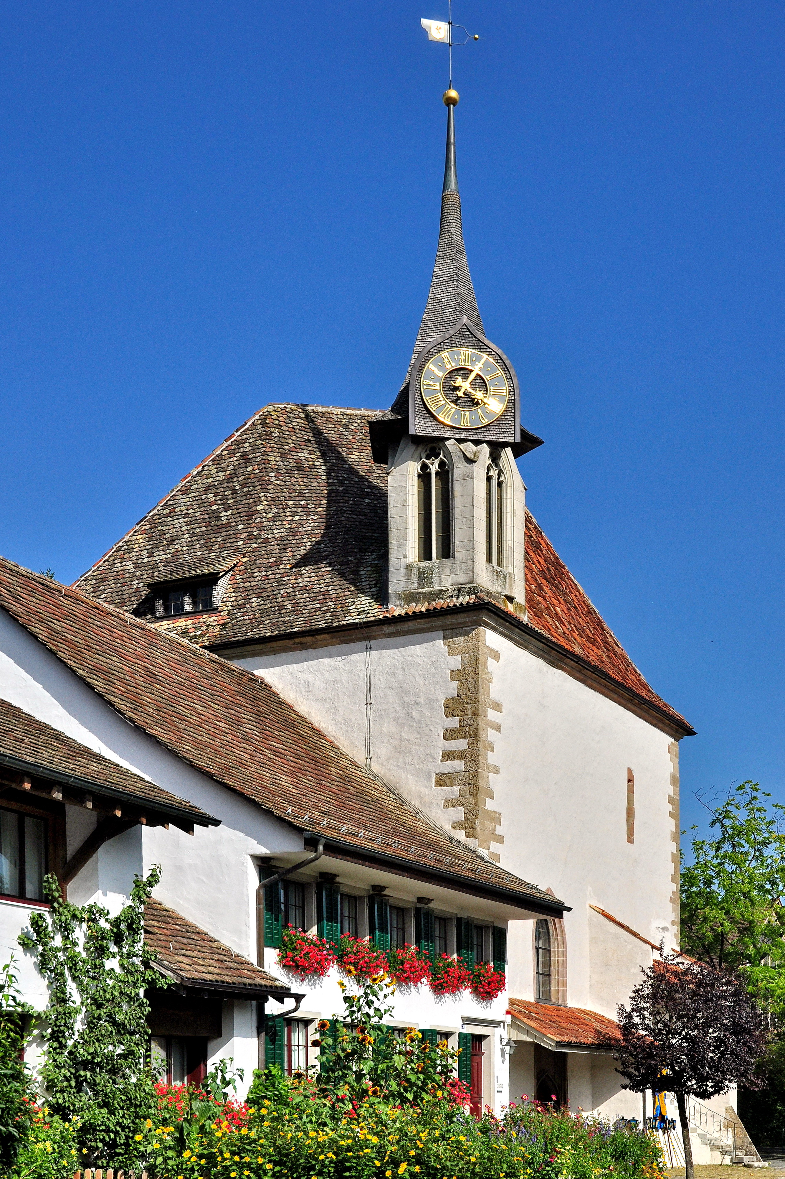 Gallus-Kapelle in Greifensee (Switzerland)